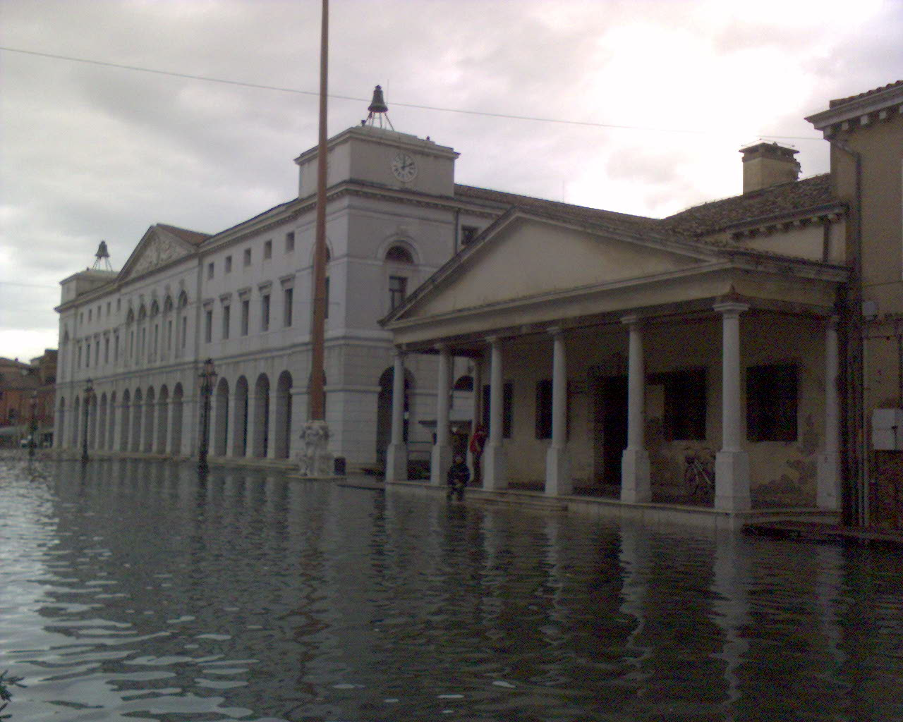 Chioggia: Palazzo Municipale e Loggia dei Bandi invase dall'acqua alta (1° dicembre 2008).